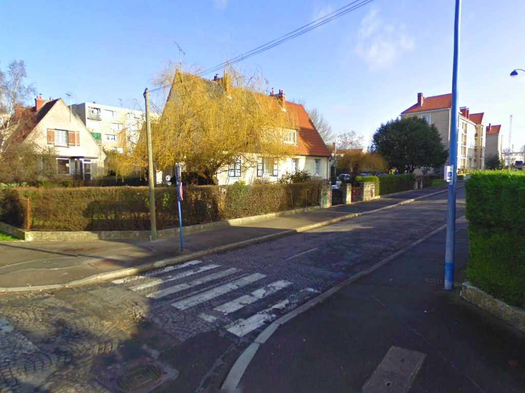 Dugny - différents logements - rue près de l'Av. du Général de Gaulle